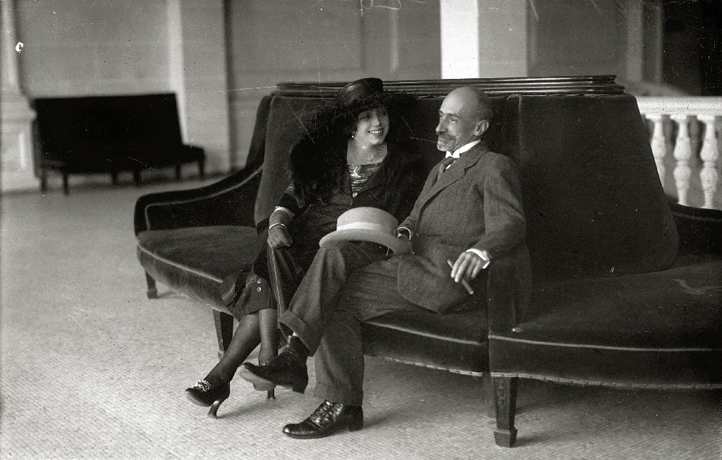 Título original: Don Jacinto Benavente, autor teatral (2/3) Localización: San Sebastián (Guipúzcoa)